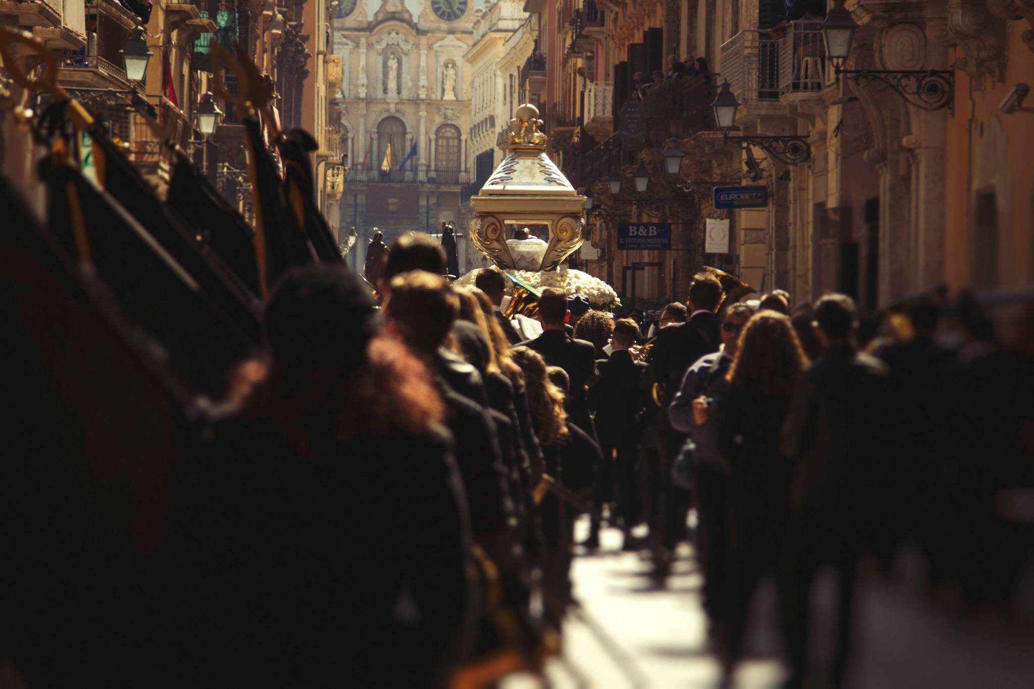 Misteri di Trapani. Siamo Alle Prime Luci Dell'alba , i primi raggi di Sole Accarezzano con totale Naturalezza I Sacri Misteri , una Luce Morbida E Diffusa , Il Lunghissimo Corteo Gli Fa Da Cornice